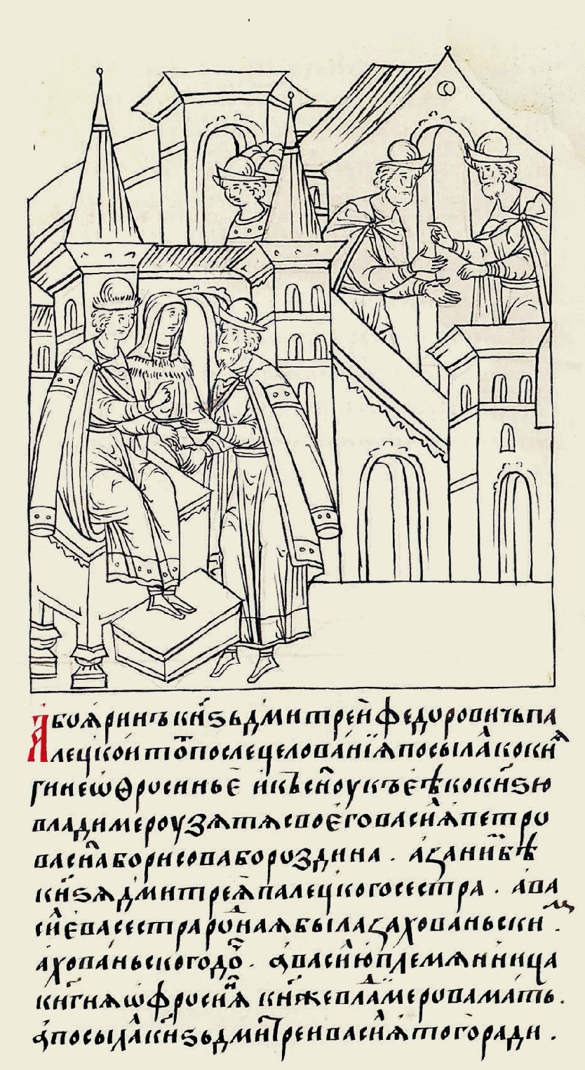 Миниатюра Лицевого летописного свода XVI в.: А боярин князь Дмитрий Федо- рович Палец- кий после целования посылал к княгине Ефросинье и к сыну ее князю Владимиру зятя своего Василия Петрова, сына Бори- сова Бороздина; за ним (замужем) была сестра князя Дмитрия Палецкого, а Василье- ва сестра родная была (замужем) за князем Хованским и дочь Хованского, а Василию племянница княгиня Ефросиния, мать князя Владимира. А посылал князь Дмитрий Васи- лия вот для чего: так как судом Бо- жьим, а государским царя и великого князя произволением взял брат царя и велико- го князя князь Юрий Васильевич дочь князя Дмитрия Палецкого, вот князь Дмитрий Палецкий и посылал Василия к княгине Ефросинье и сыну ее князю Владимиру, чтобы княгиня и сын ее пожаловали, князю Юрию Василиевичу и дочери его, князя Юрия княгине, дали удел по духовной гра- моте великого князя, а они им, княгине Ефросинье и князю Владимиру, будут на царство не сопро- тивны, и служить им готовы.».